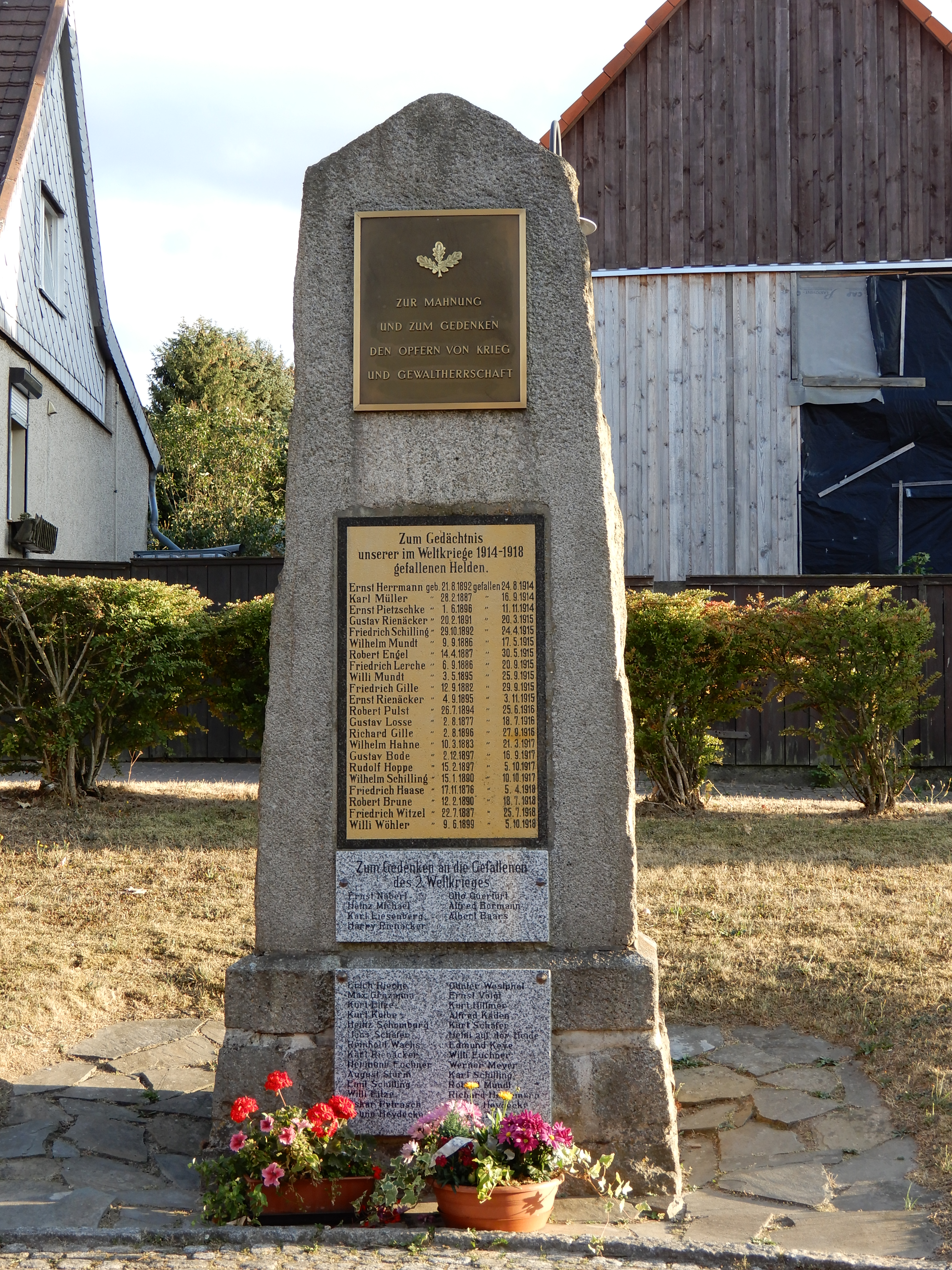 Kriegerdenkmal für die Gefallenen des Ersten und Zweiten Weltkrieges